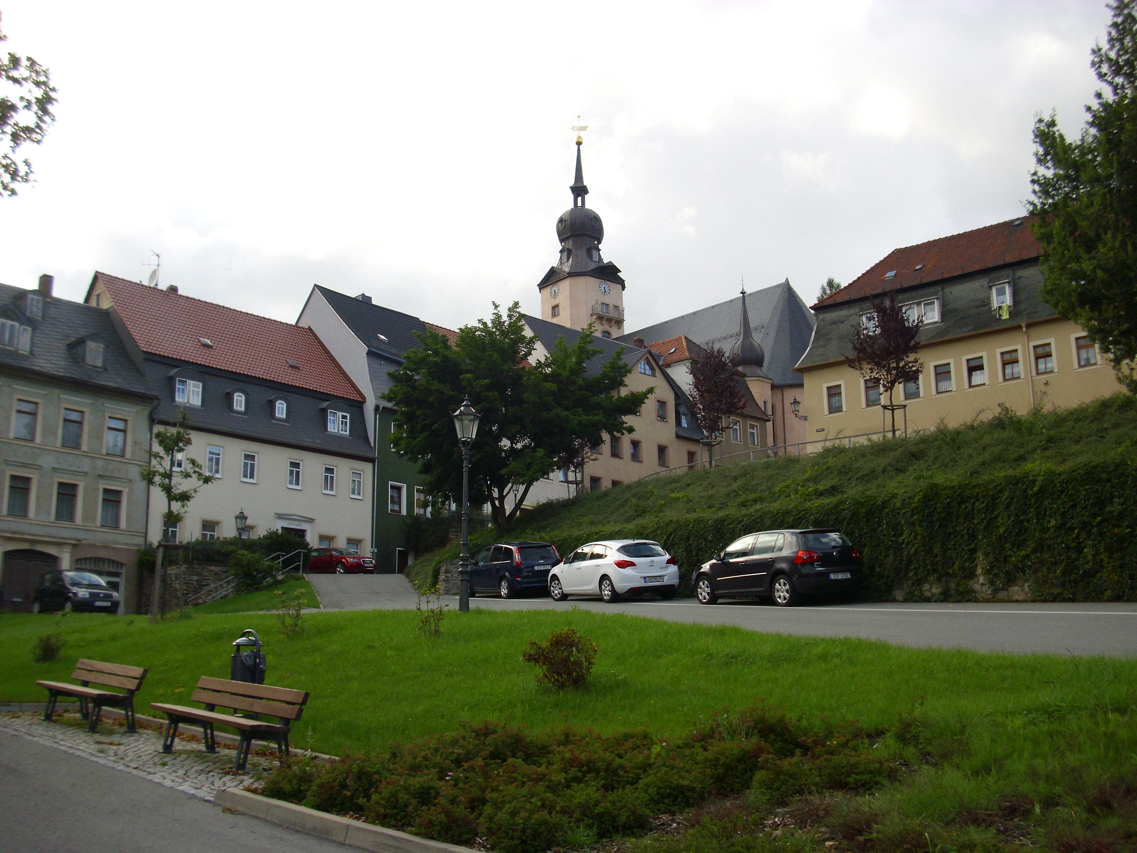 Blick in Richtung Nordwesten über den Altmarkt in Richtung St. Christopheri